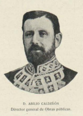 Abilio Calderón, Director General de Obras Públicas